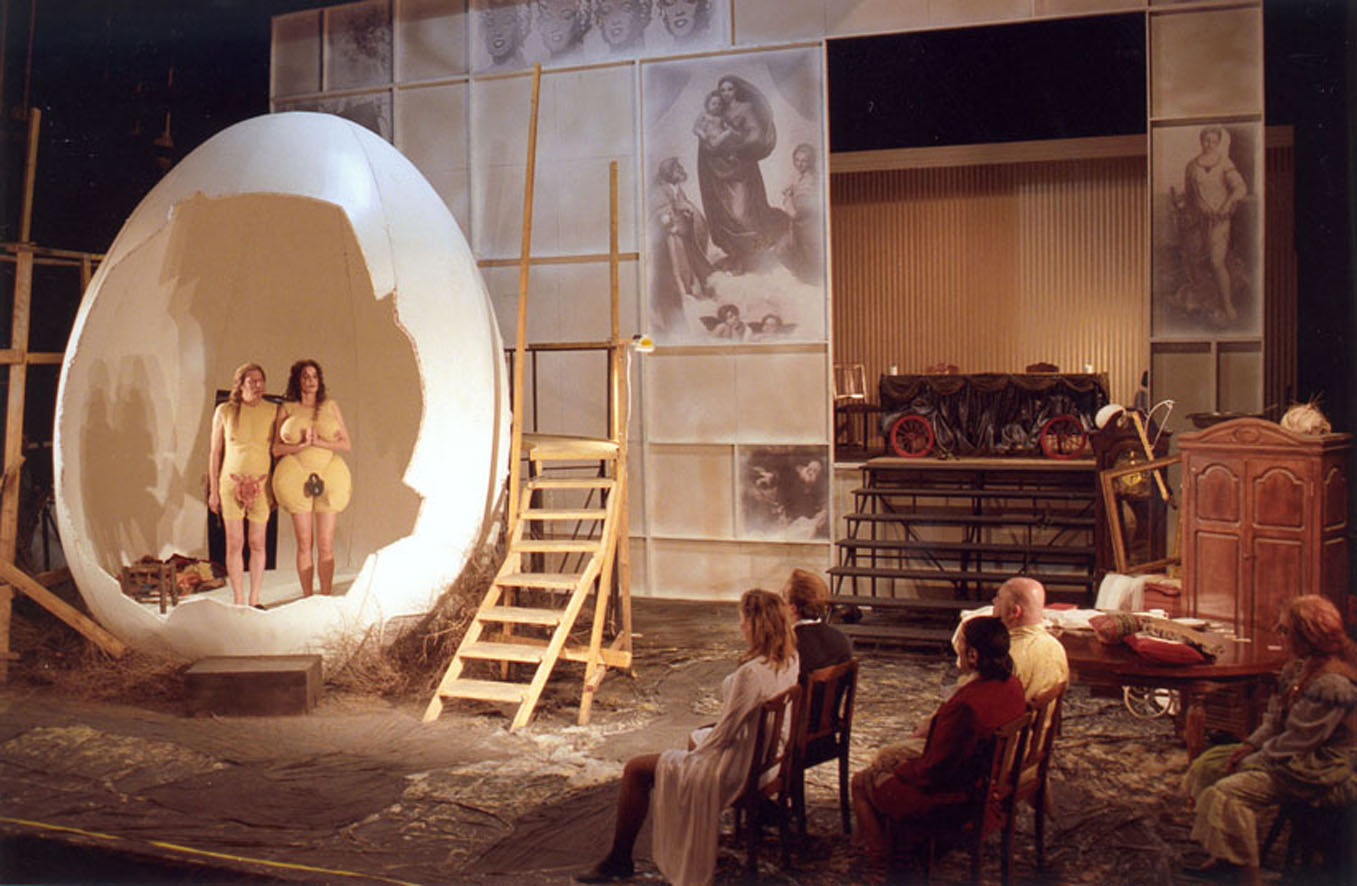 ההצגה טנגו, תיאטרון הבימה